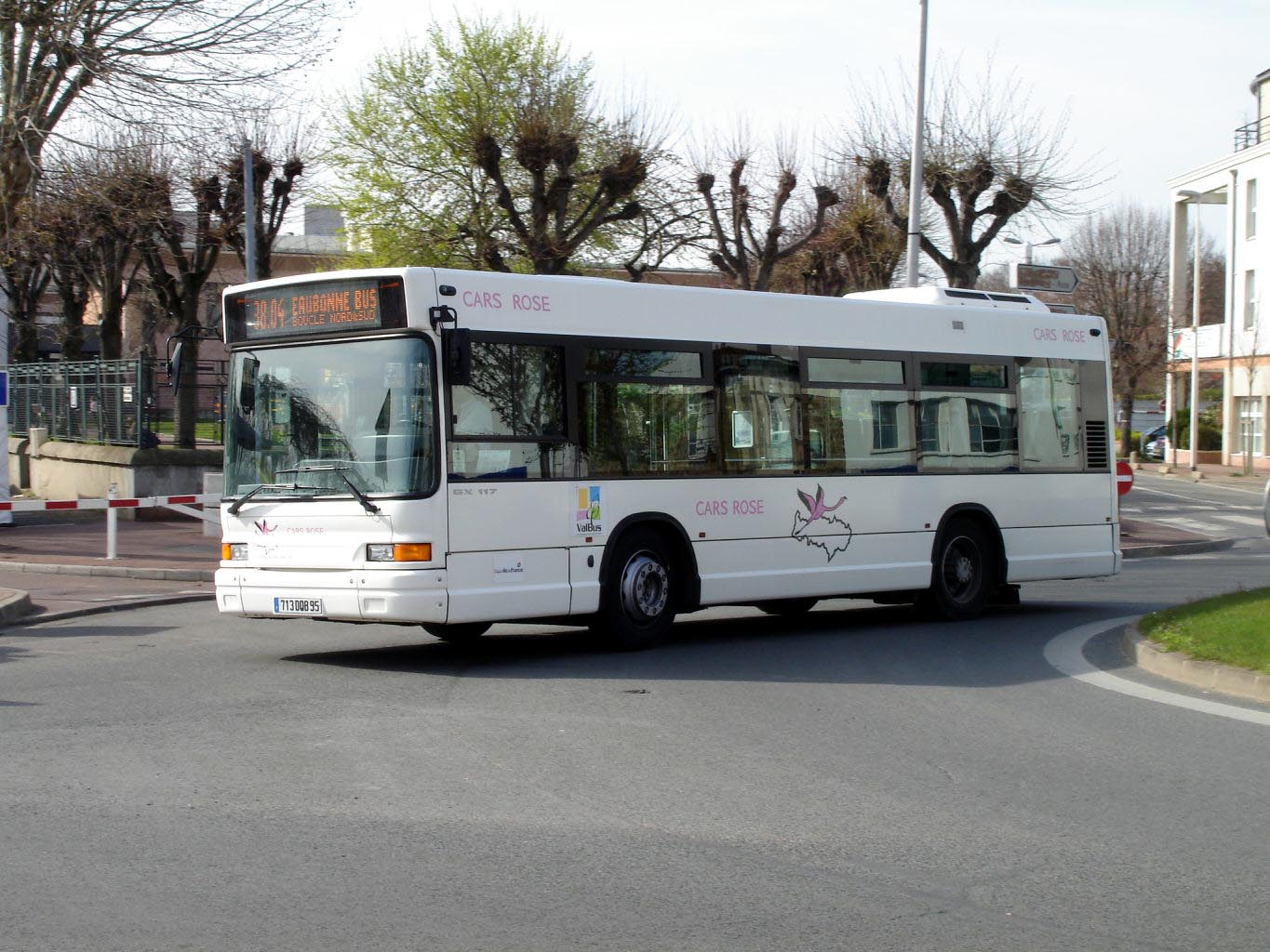 Navette municipale "Eaubonne bus" à Eaubonne (Val-d'Oise), France Ligne 38.04 des Cars Rose Avril 2007 Photo personnelle de Clicsouris